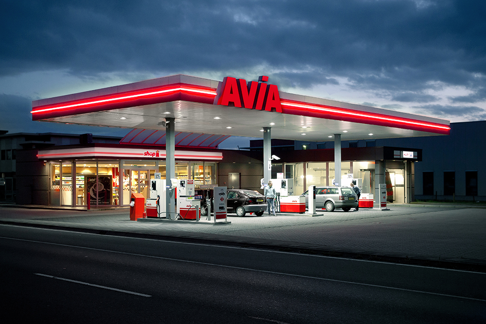 avond fotografie